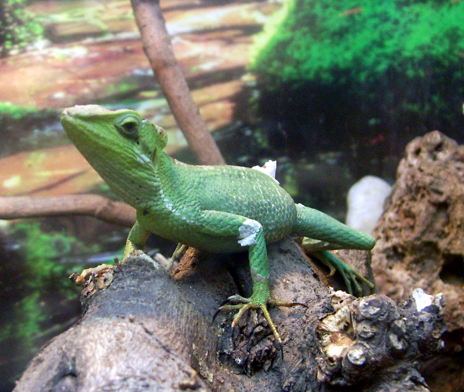 玉米蜥， Laemanctus longipes，于北京动物园